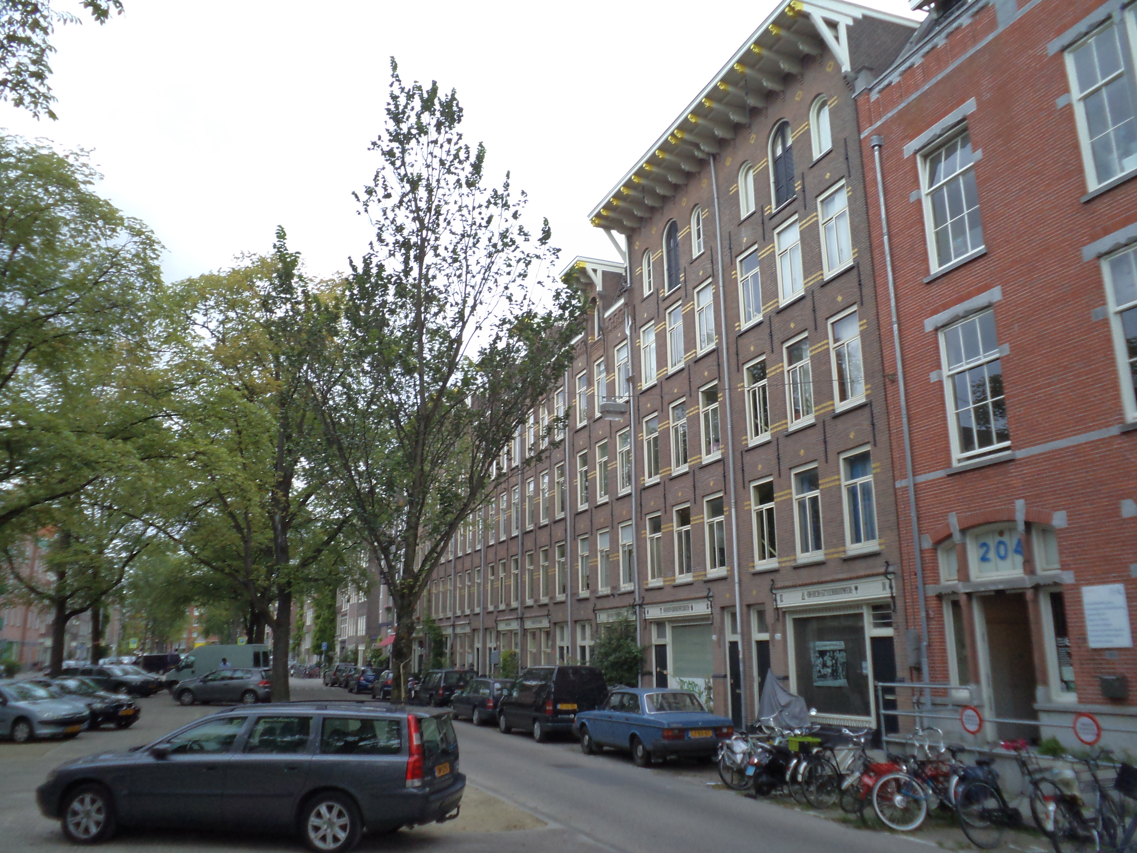 Complex arbeiderswoningen uit 1896